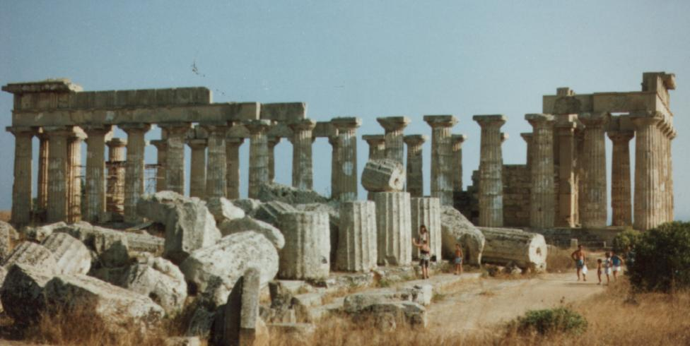 Templi F (in primo piano) ed E di Selinunte